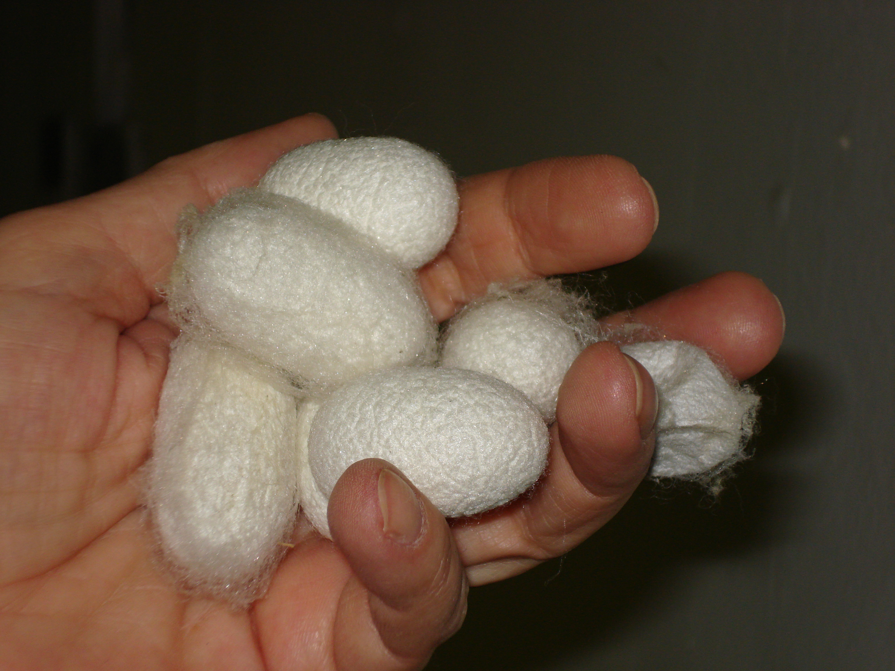 tkalnia jedwabiu Shuzou - kokony jedwabników